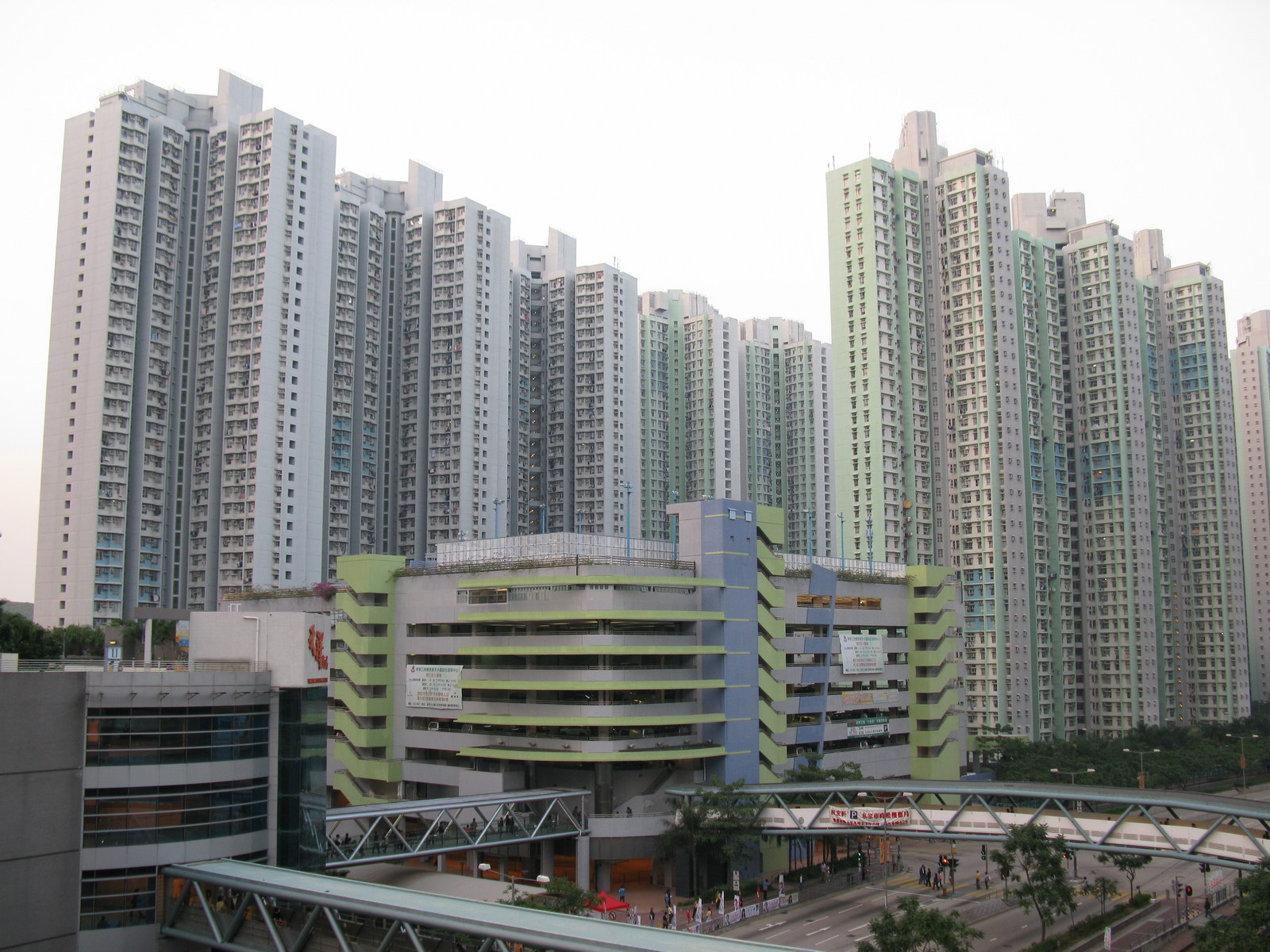 天水圍-天恒邨 Tin Heng Estate, Tin Shui Wai